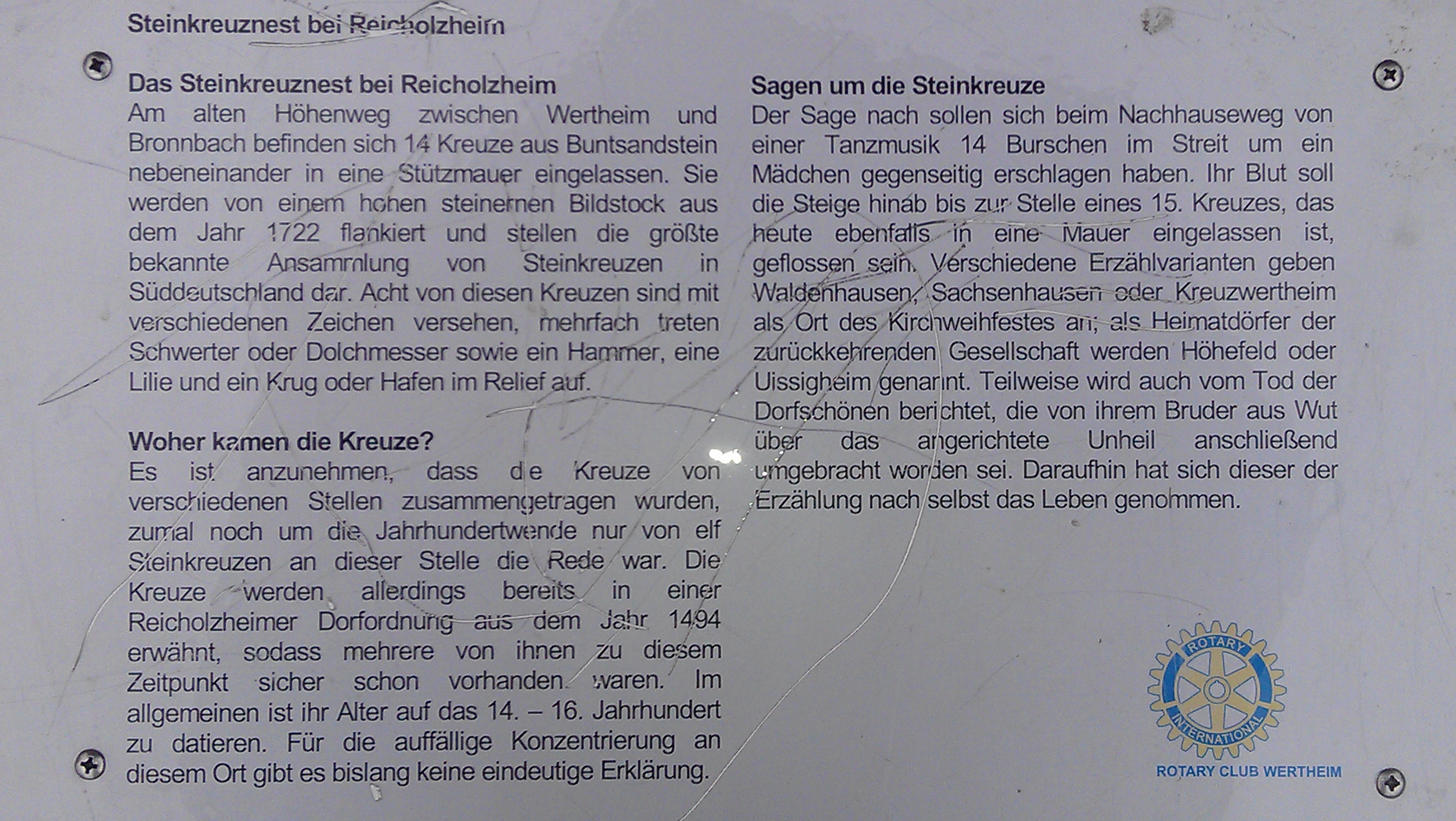 Hinweisschild zum Steinkreuznest in Reicholzheim. Laut der örtlichen Sage sollen sich 14 Burschen im Streit um ein Mädchen gegenseitig erschlagen haben.